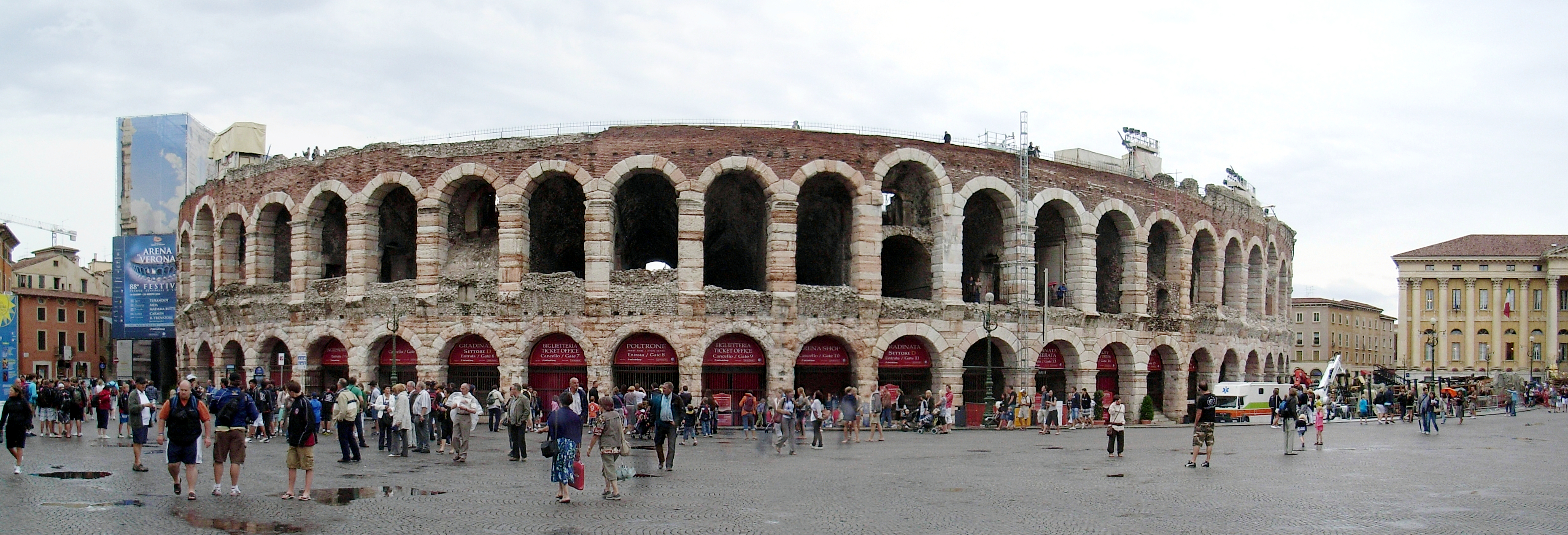 Panorama Amphitheater Verona